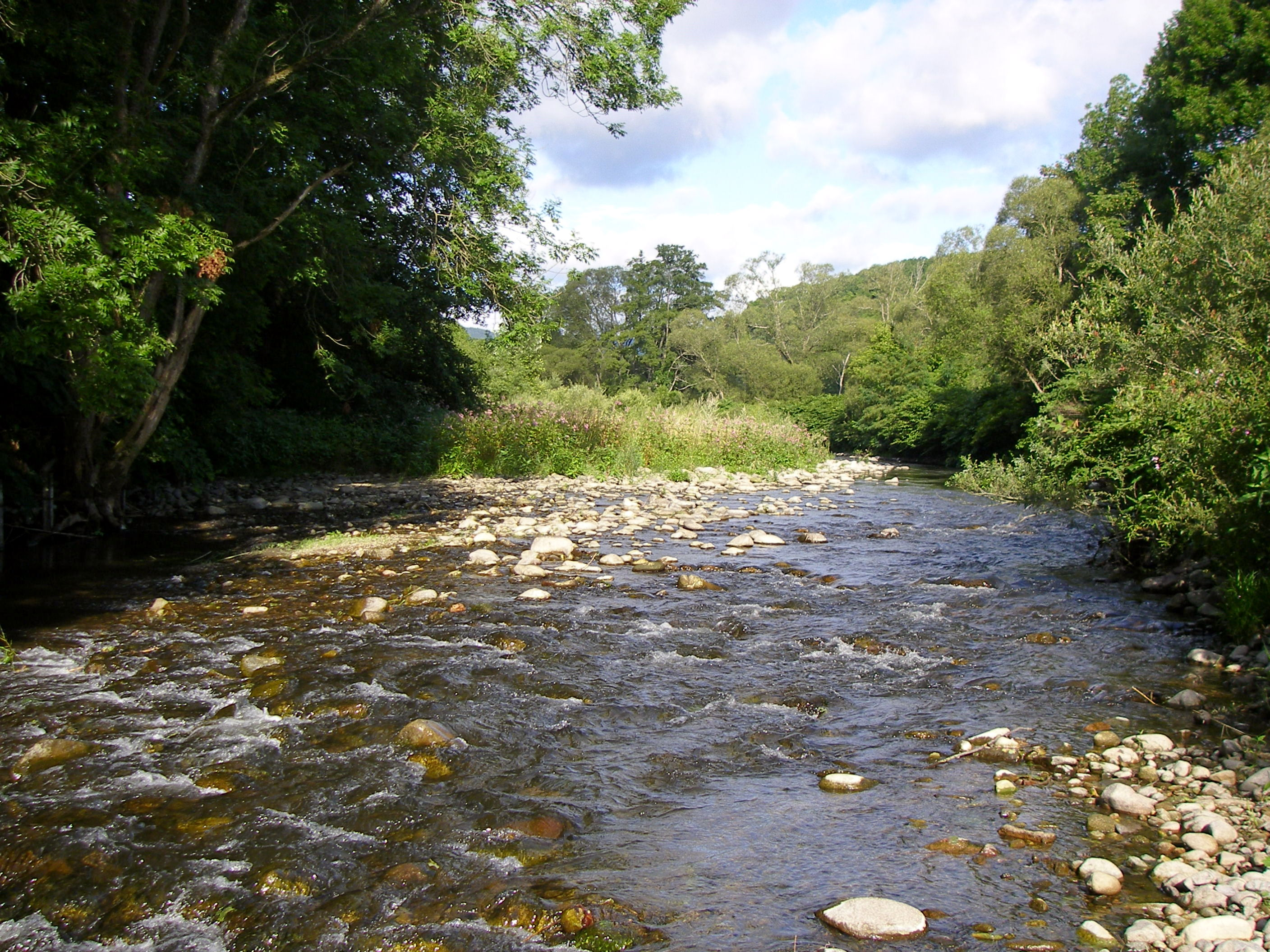 La Doller entre Guewenheim et Sentheim (Haut-Rhin, France)